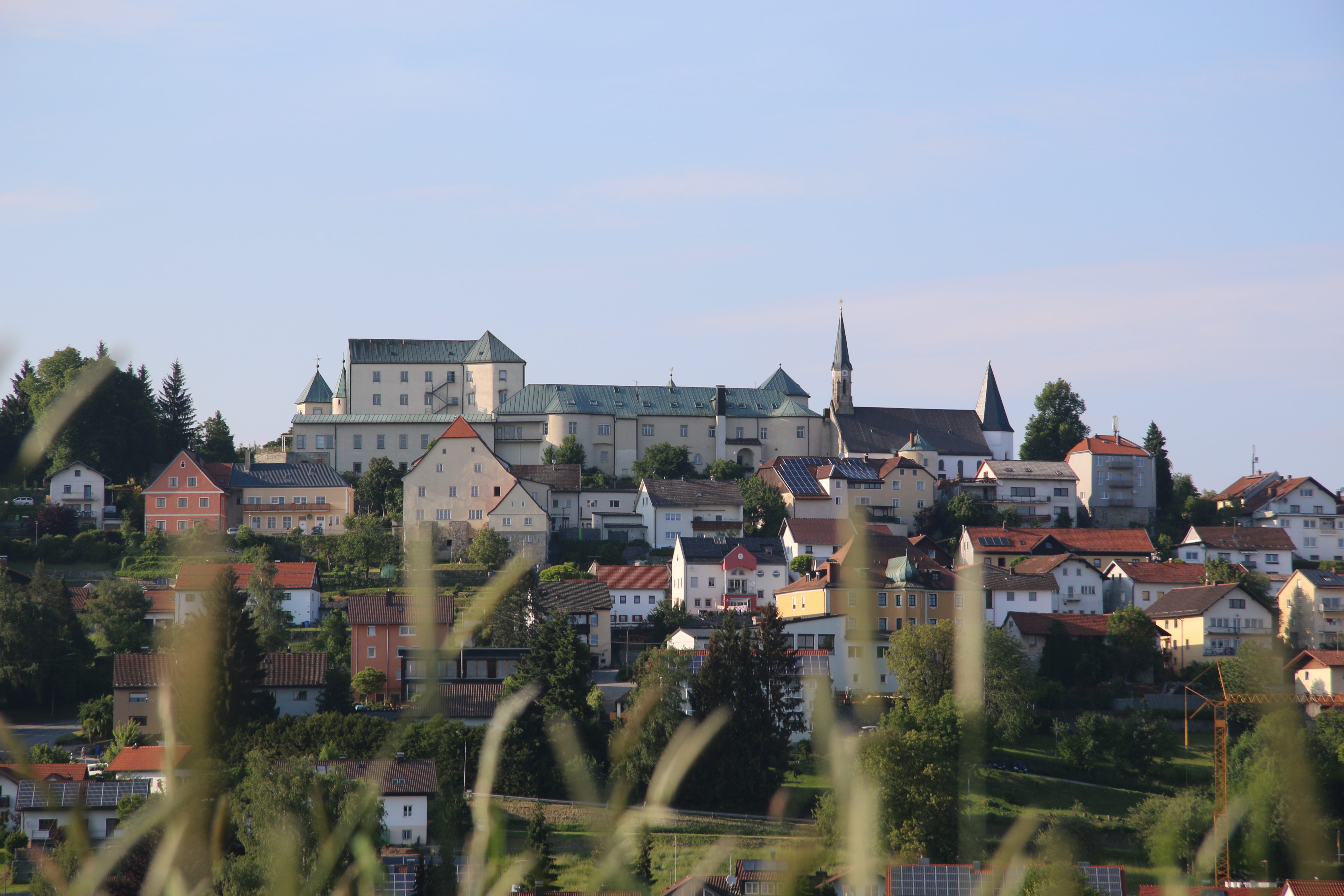 Südansicht des Schlossbergs in Fürstenstein